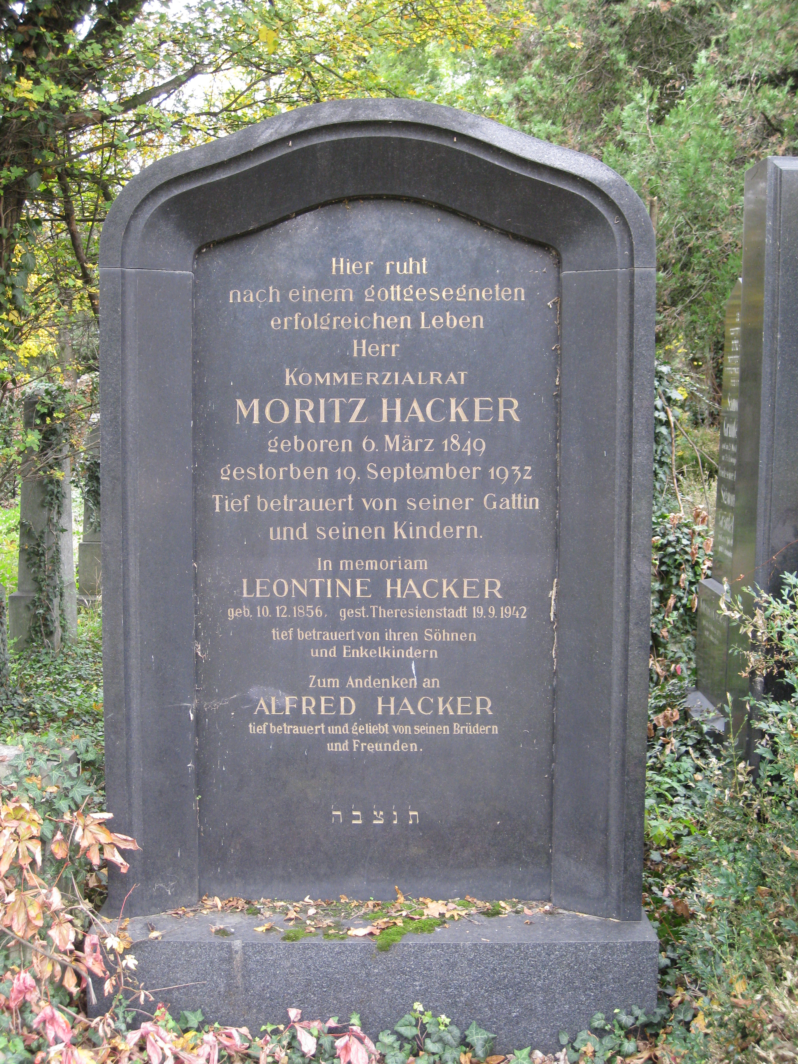 Grabstelle von Moritz Hacker am Wiener Zentralfriedhof Gruppe 50, Reihe 59, Nr. 23.